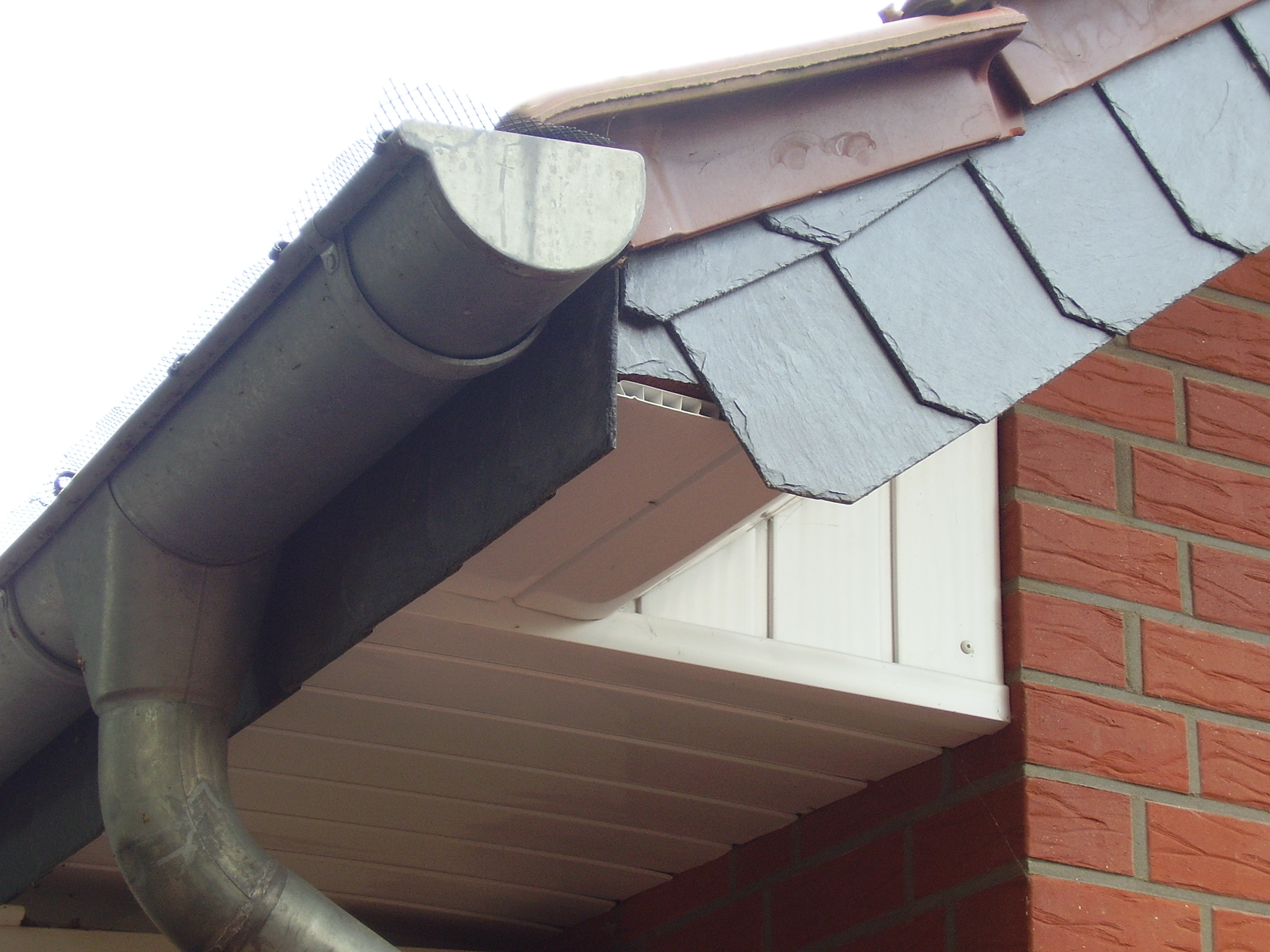 Dachkasten roof, house